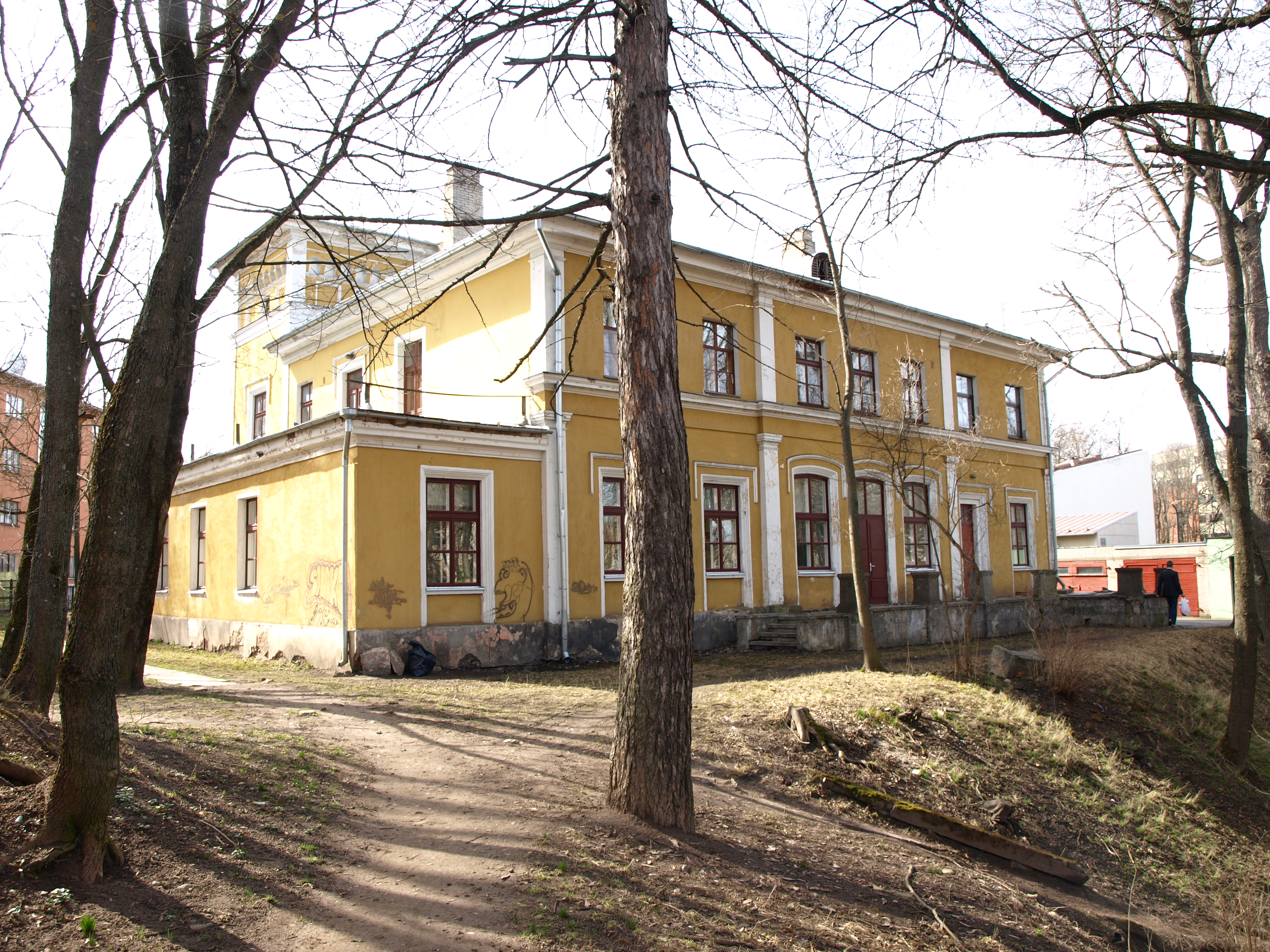 Elamu Tartus Pepleri 4, 1870.a.